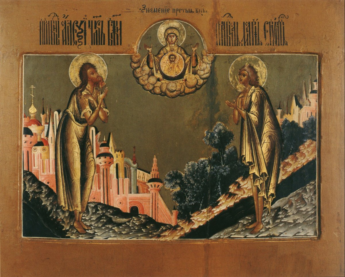 Святитель Алексий Человек Божий и преподобная Мария Египетская. Весна 1648 г. Икона написана к бракосочетанию царя Алексея Михайловича с царицей Марией Ильиничной/ (48Х58,5дерево, левкас, темпера.) Инв. № Ж-166